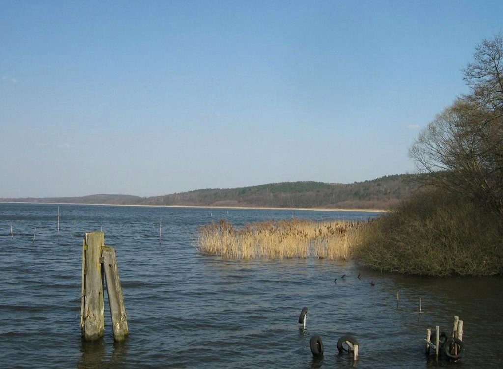 the Lake "Schwielowsee" (River Havel)in Brandenburg (Germany) - Blick von Ferch über den Schwielowsee, am rechten Ufer, die Ausläufer des Wietkikenberges